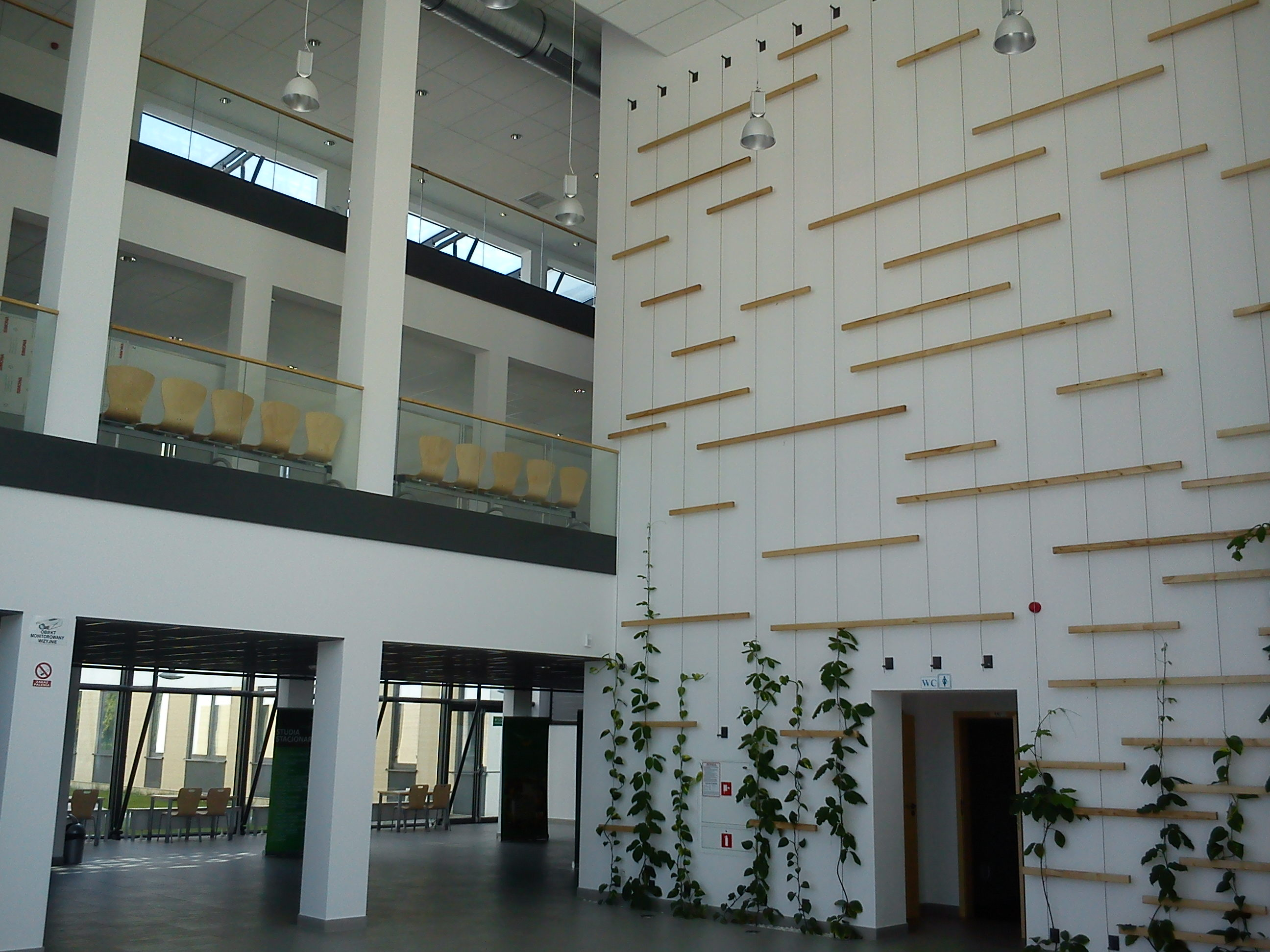 Biocentrum Uniwersytetu Przyrodniczego, Poznań, ul. Dojazd.